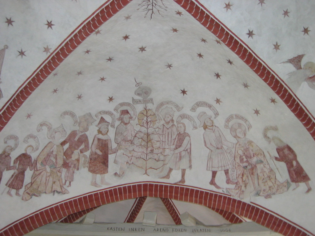 Hl. Sippe, Loxstedt, St.Marien, Ende 15. Jhdt.